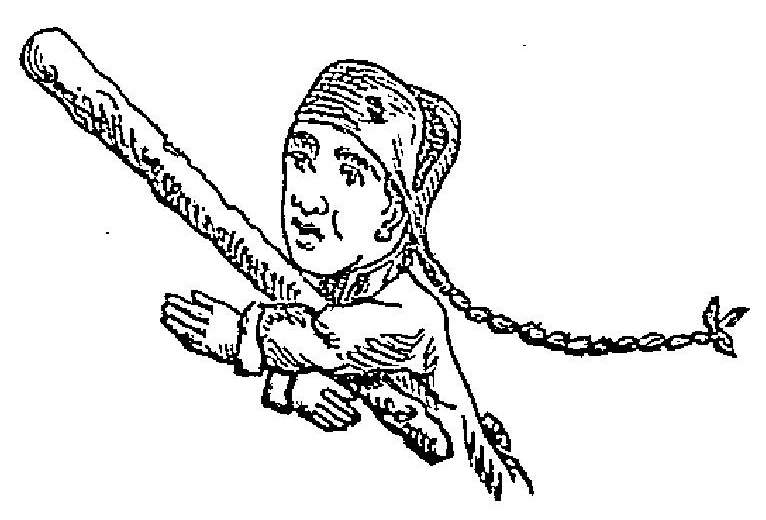 Image de la première page de "Le Petit théâtre de Guignol, contenant trois pochades en un acte, imitées de Mourguet et Cie"